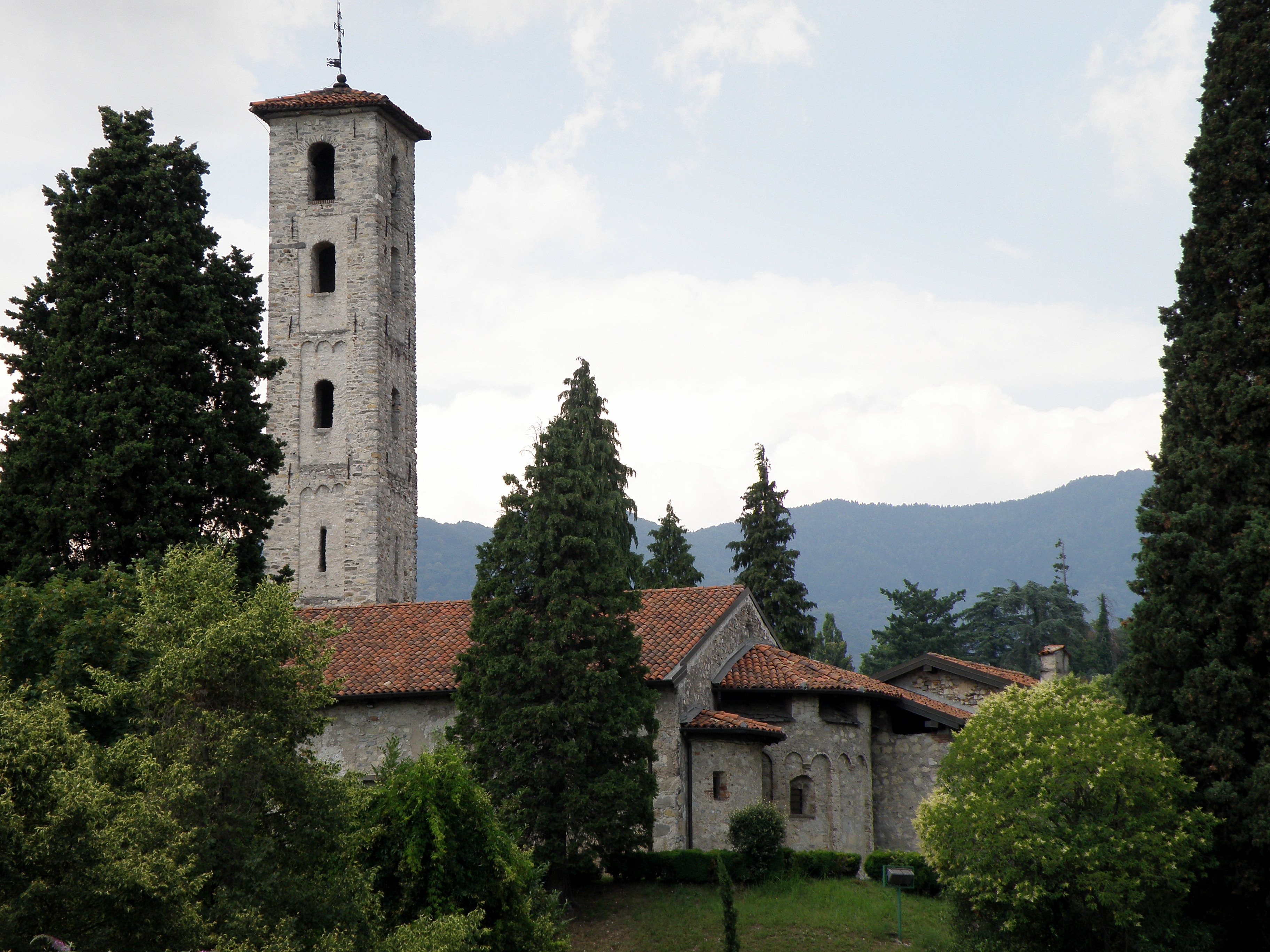 Gemonio, comm. italienne de la prov. de Varèse (Lombardie). Église romane Saint-Pierre (chiesa di San Pietro).